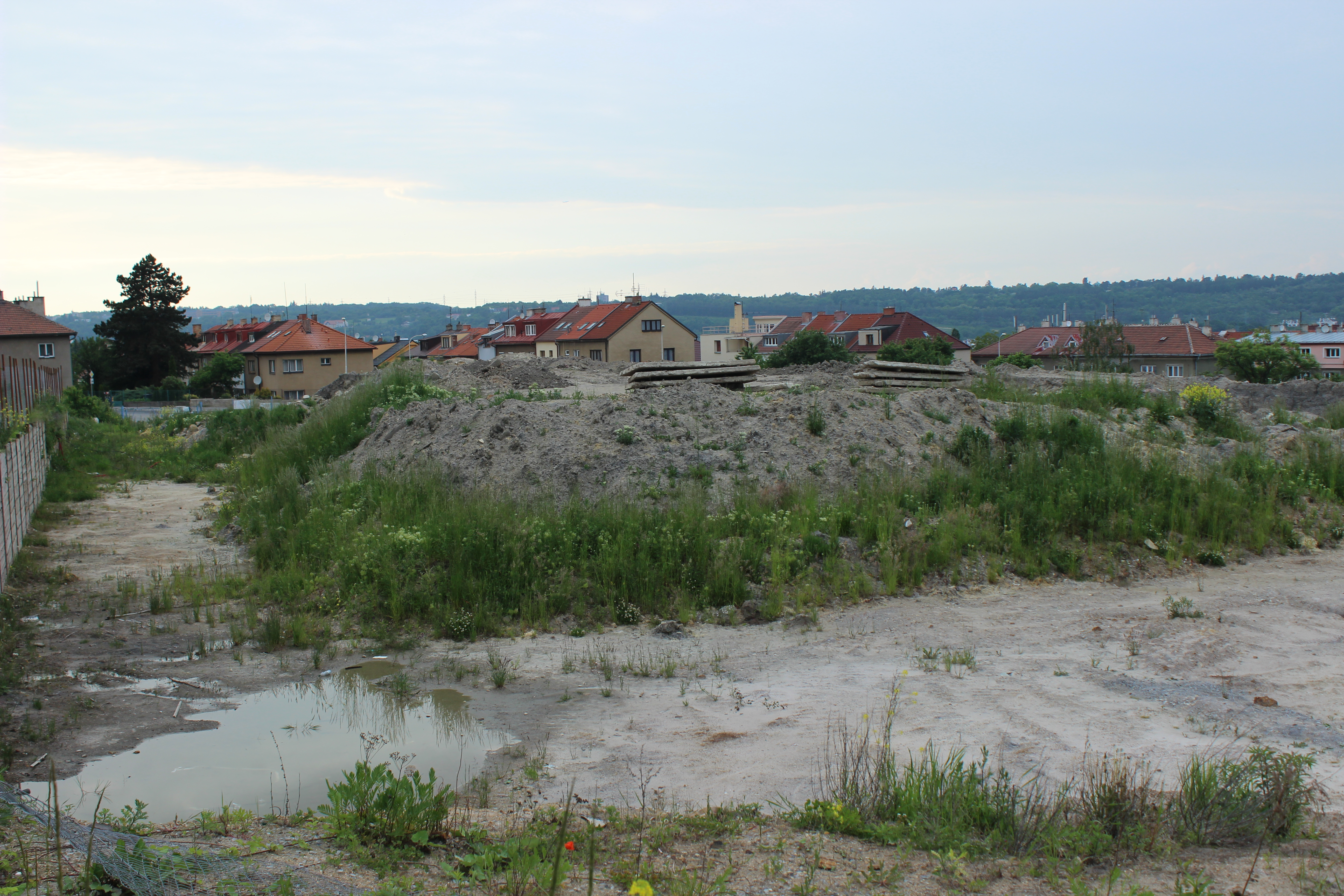 Prostor bývalého plaveckého bazénu ZPA Košíře v pražské ulici Naskové.